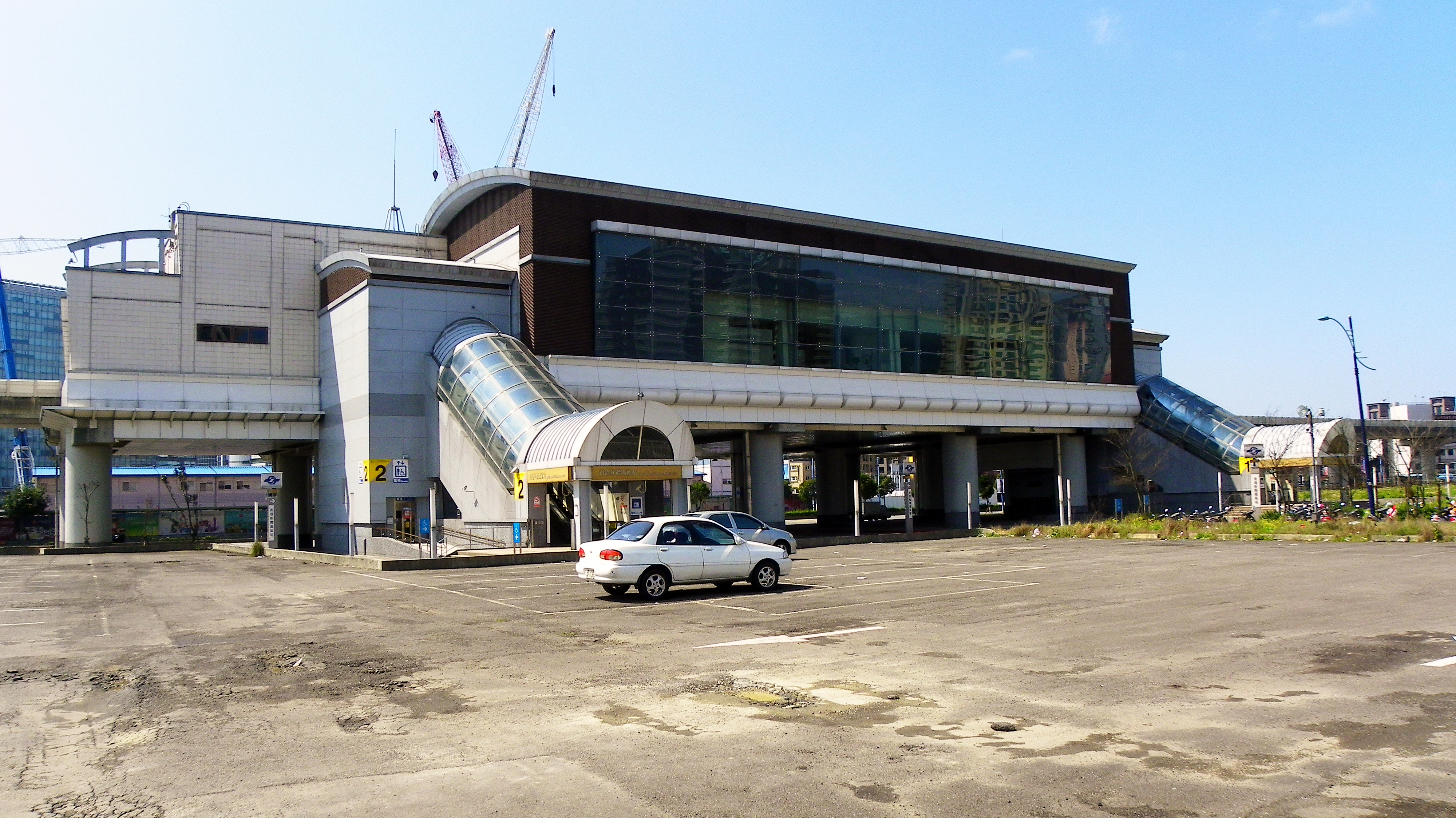 台北捷運内湖線南港軟体園区駅駅前。